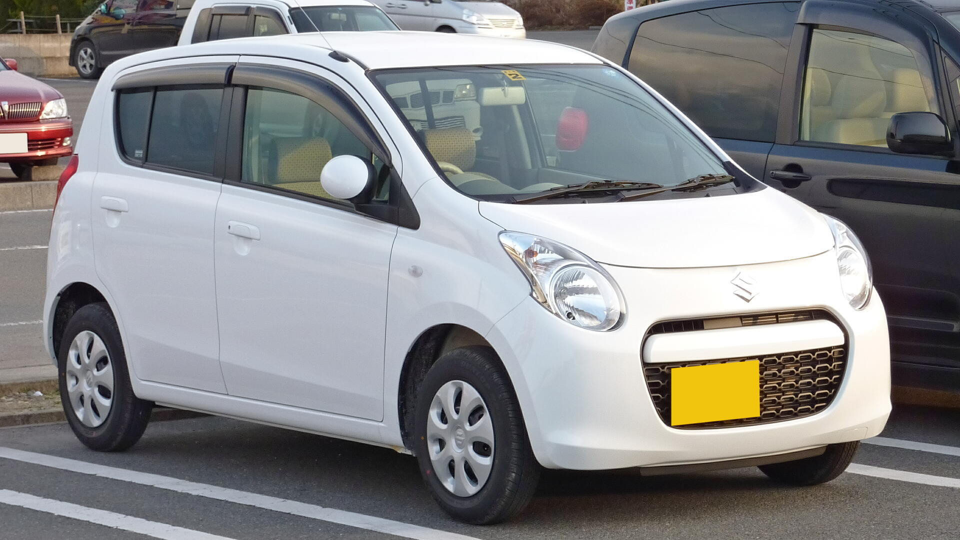 スズキ・アルト（7代目）